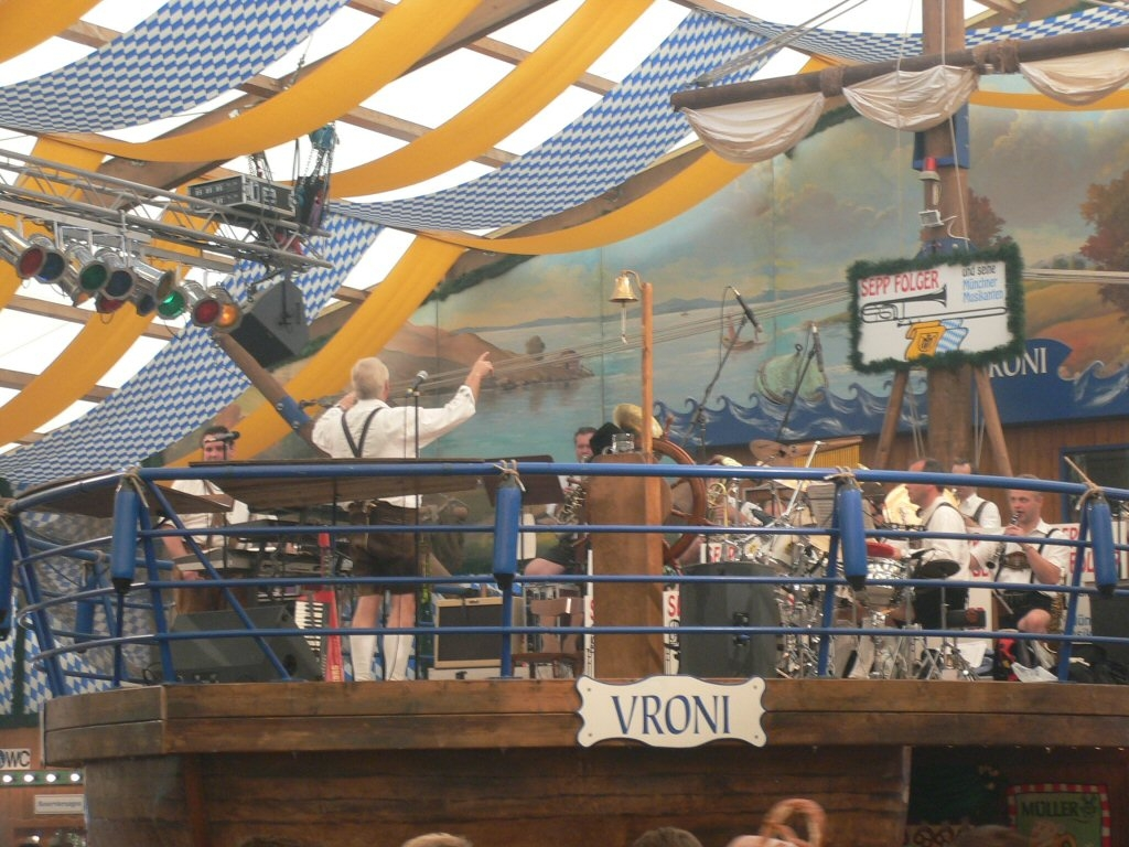 Musik auf dem Oktoberfest